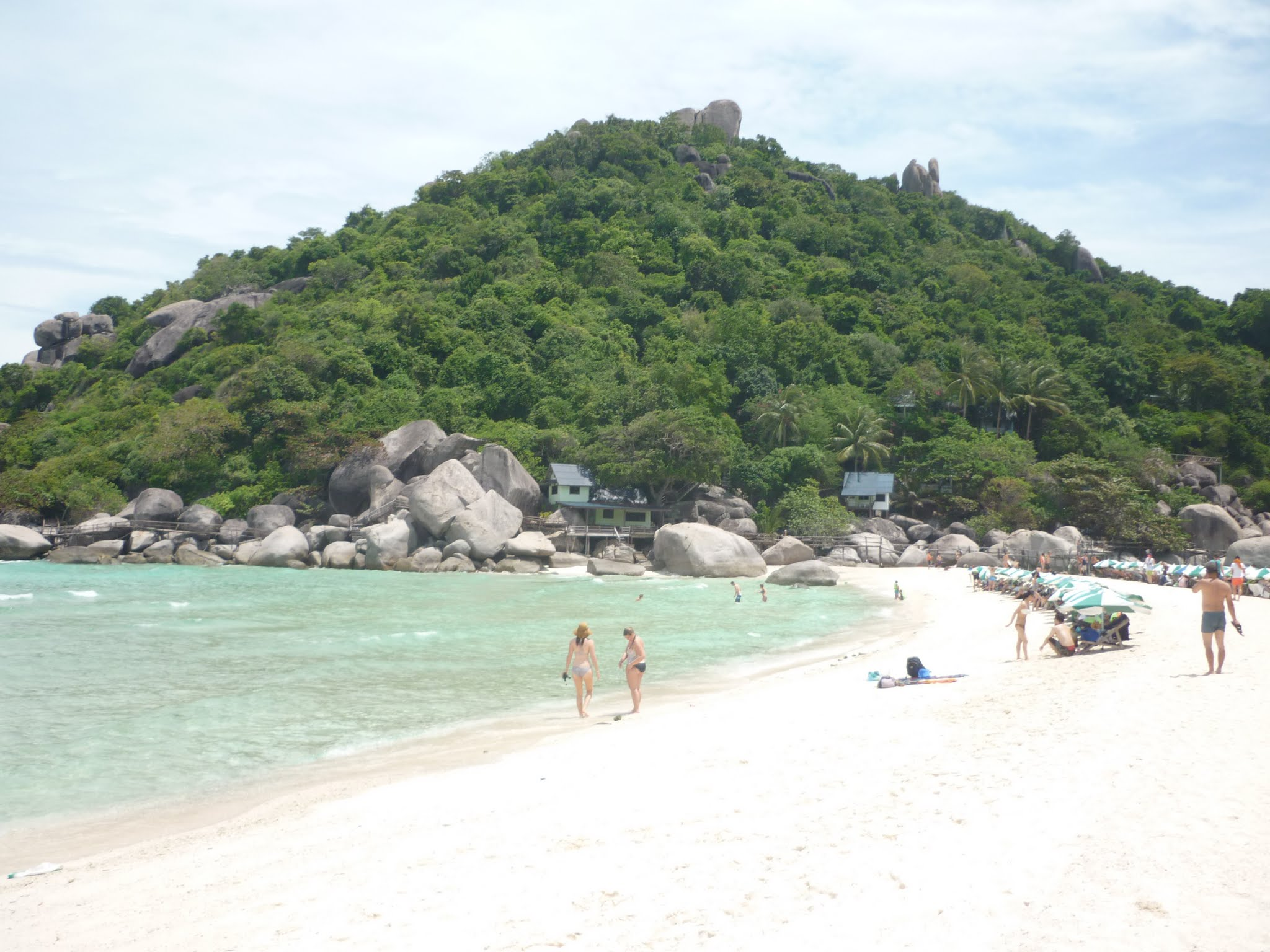 koh nangyuan